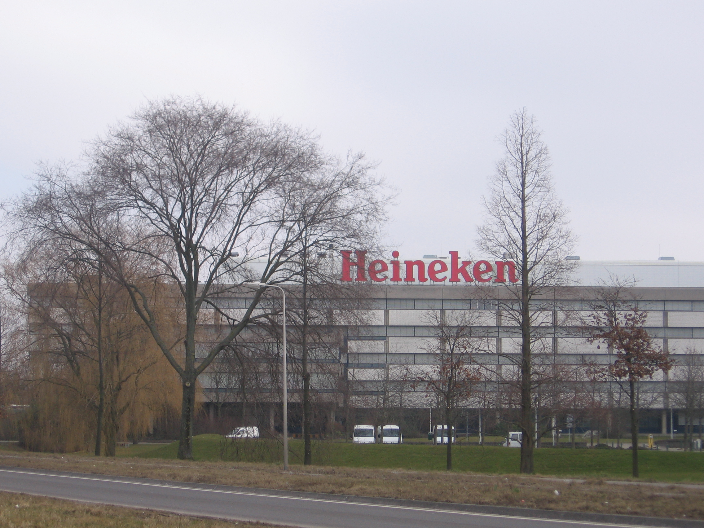 Zoeterwoude and surroundings